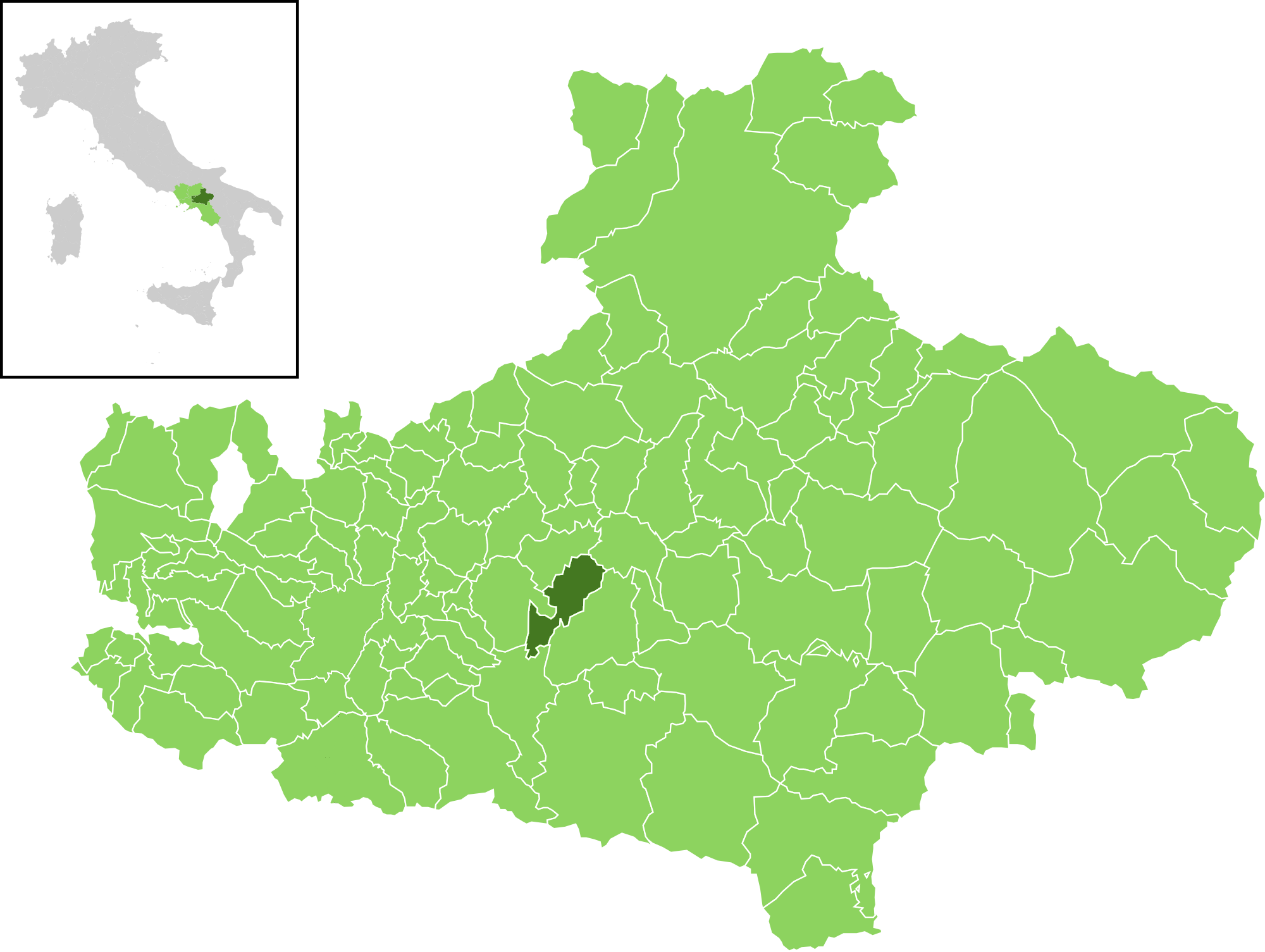 Il comune all'interno della provincia di Avellino